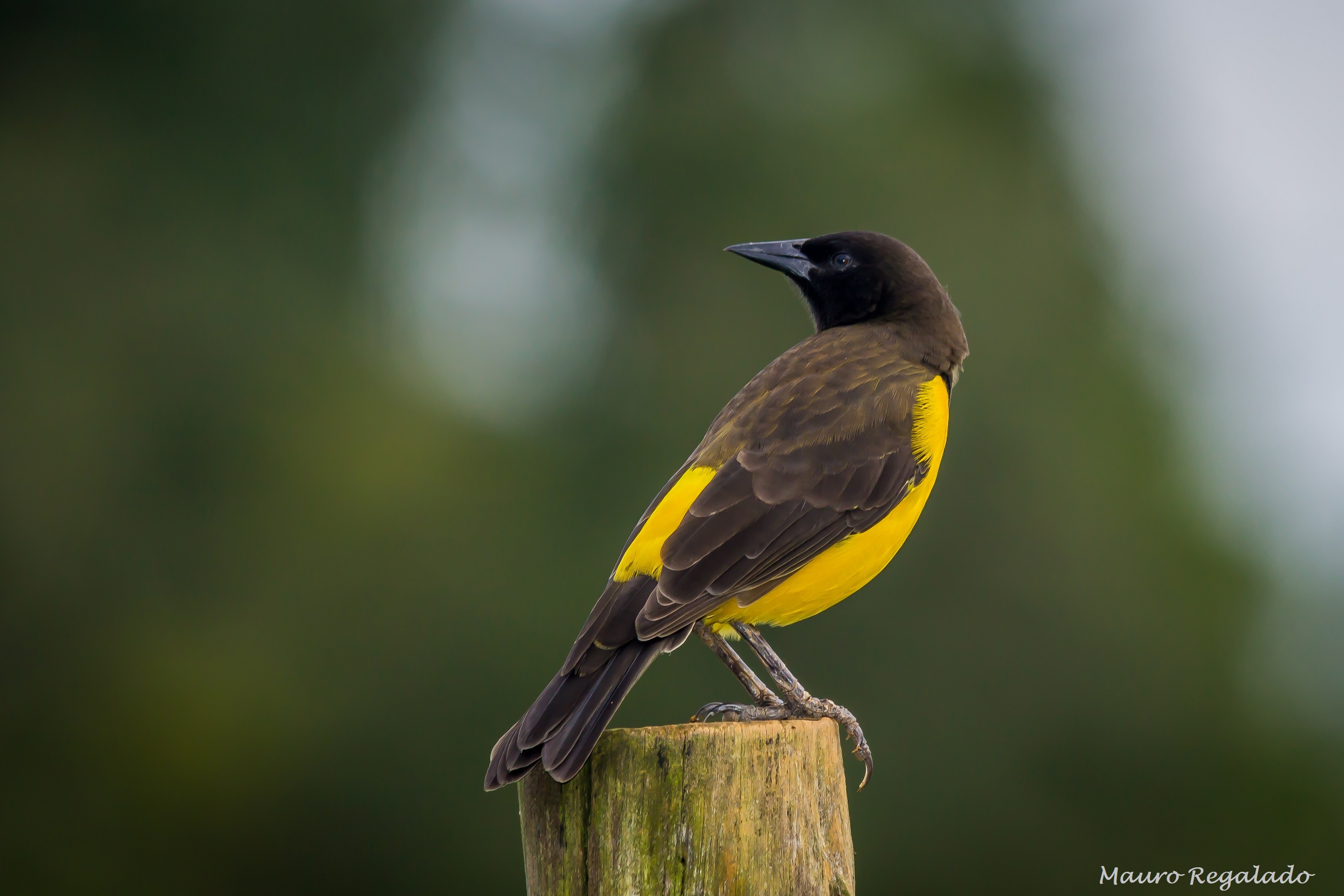 Chopim-do-brejo Pseudoleistes guirahuro (animal - cordado - tetrapoda - Aves)